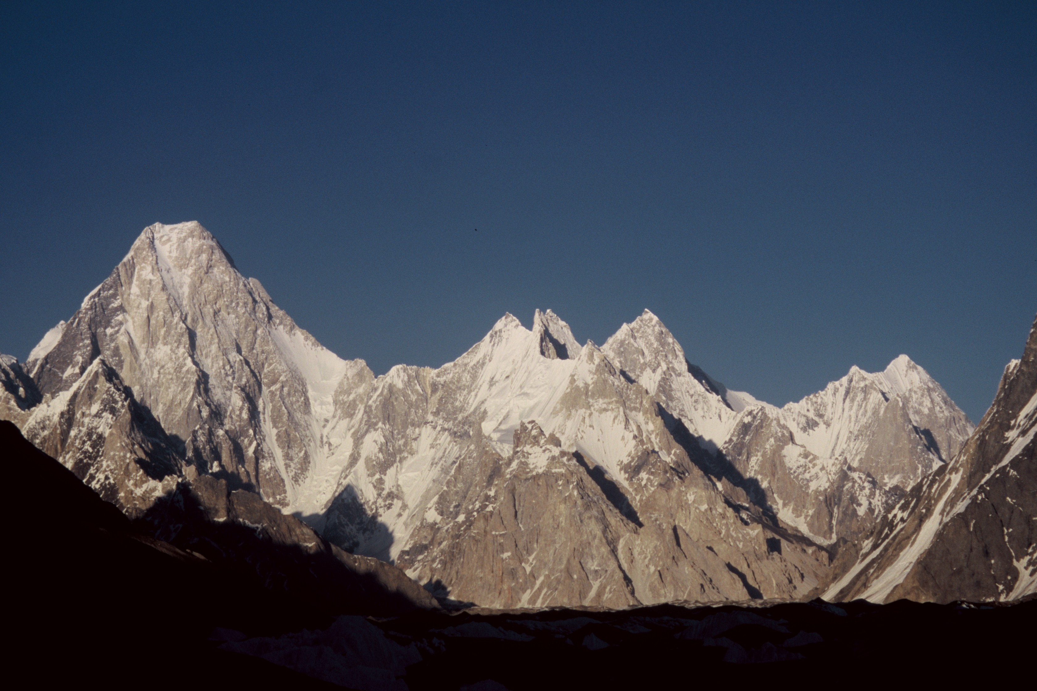 Gasherbrum IV, VI, V in Karakoram mountain range, Pakistan